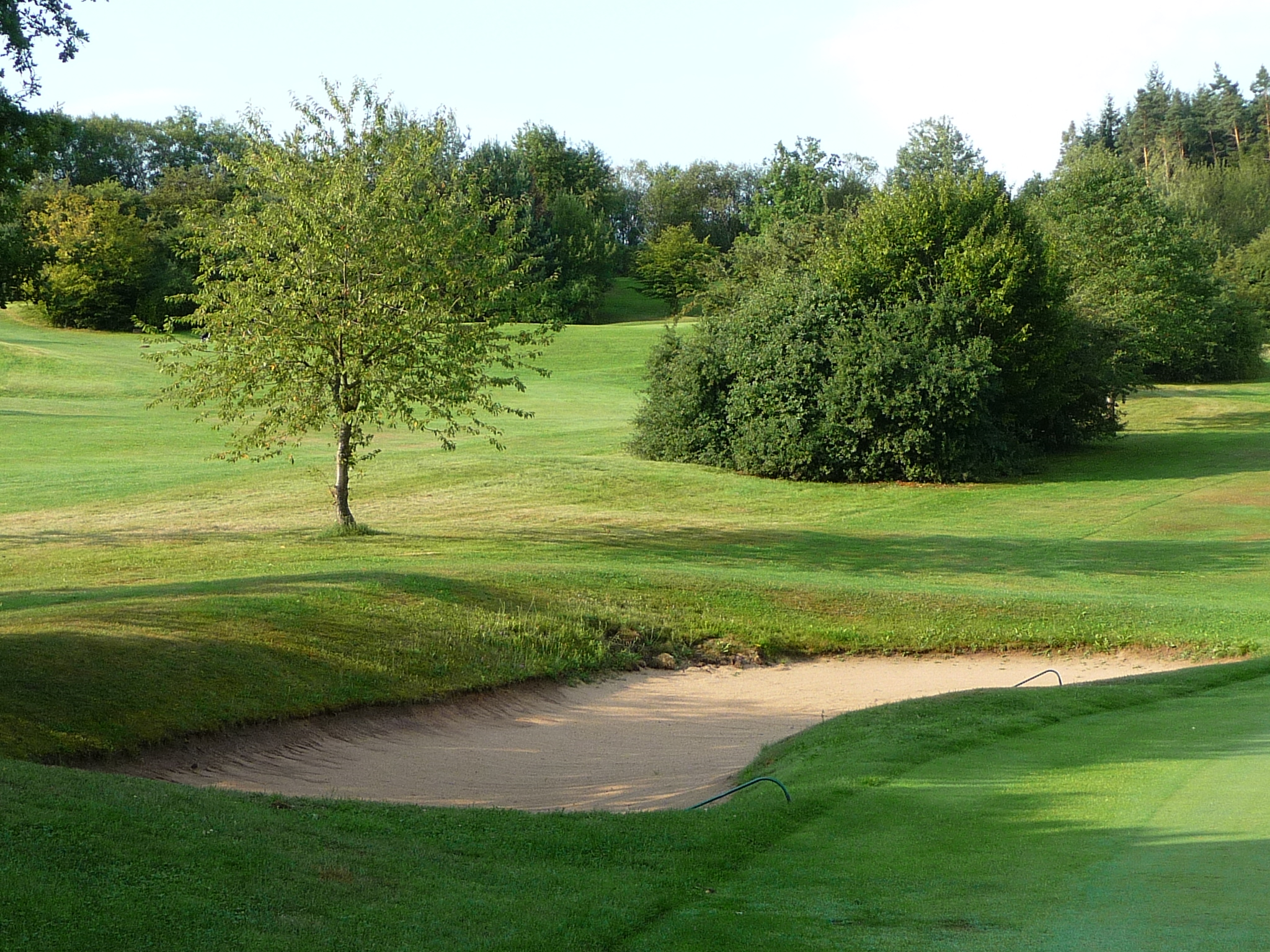 Golfplatz in Reichmannsdorf, Oberfranken